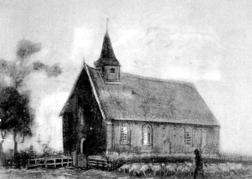 Kerk van Zweeloo geschetst door van Vincent van Gogh